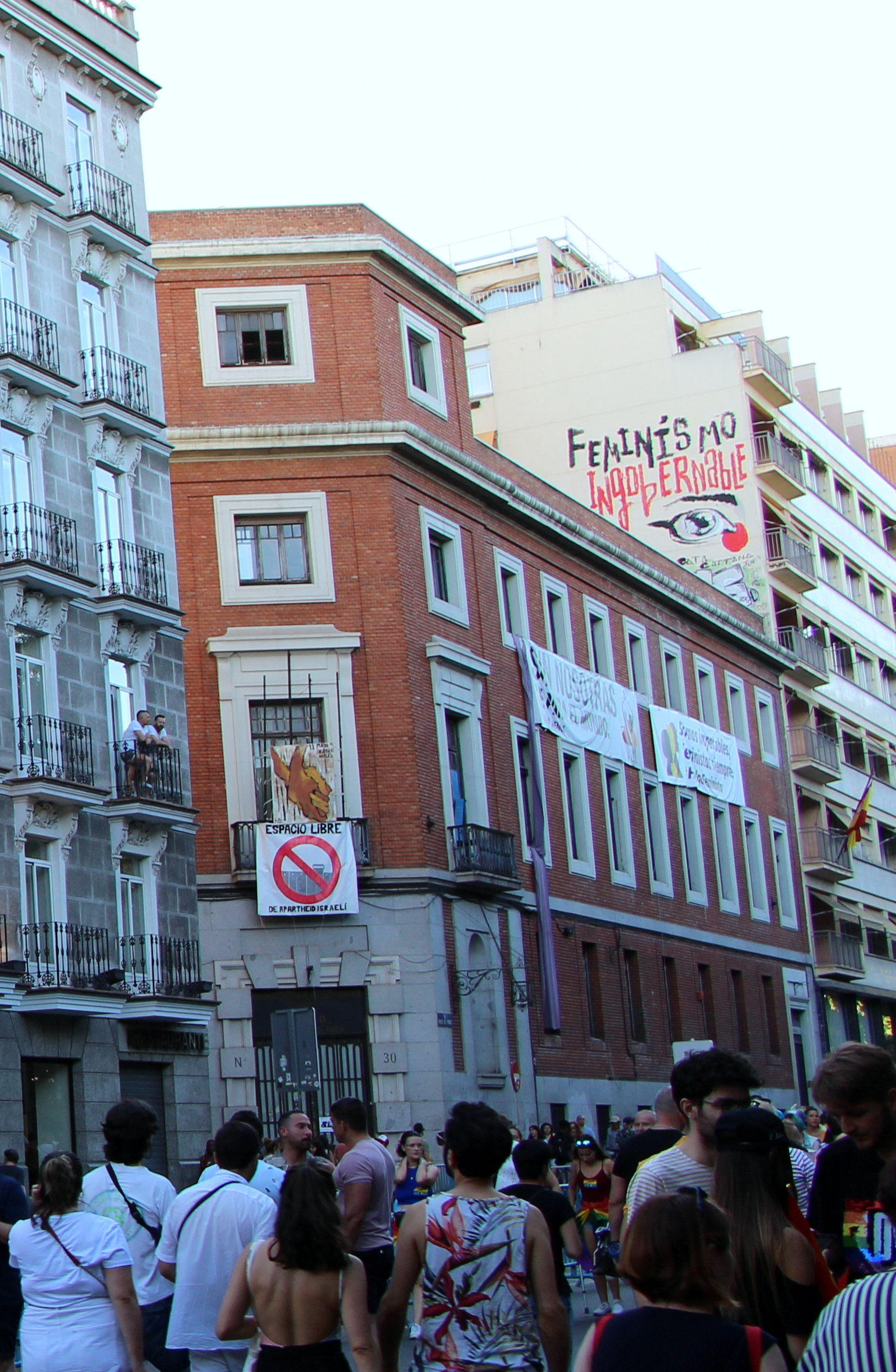 La Ingobernable